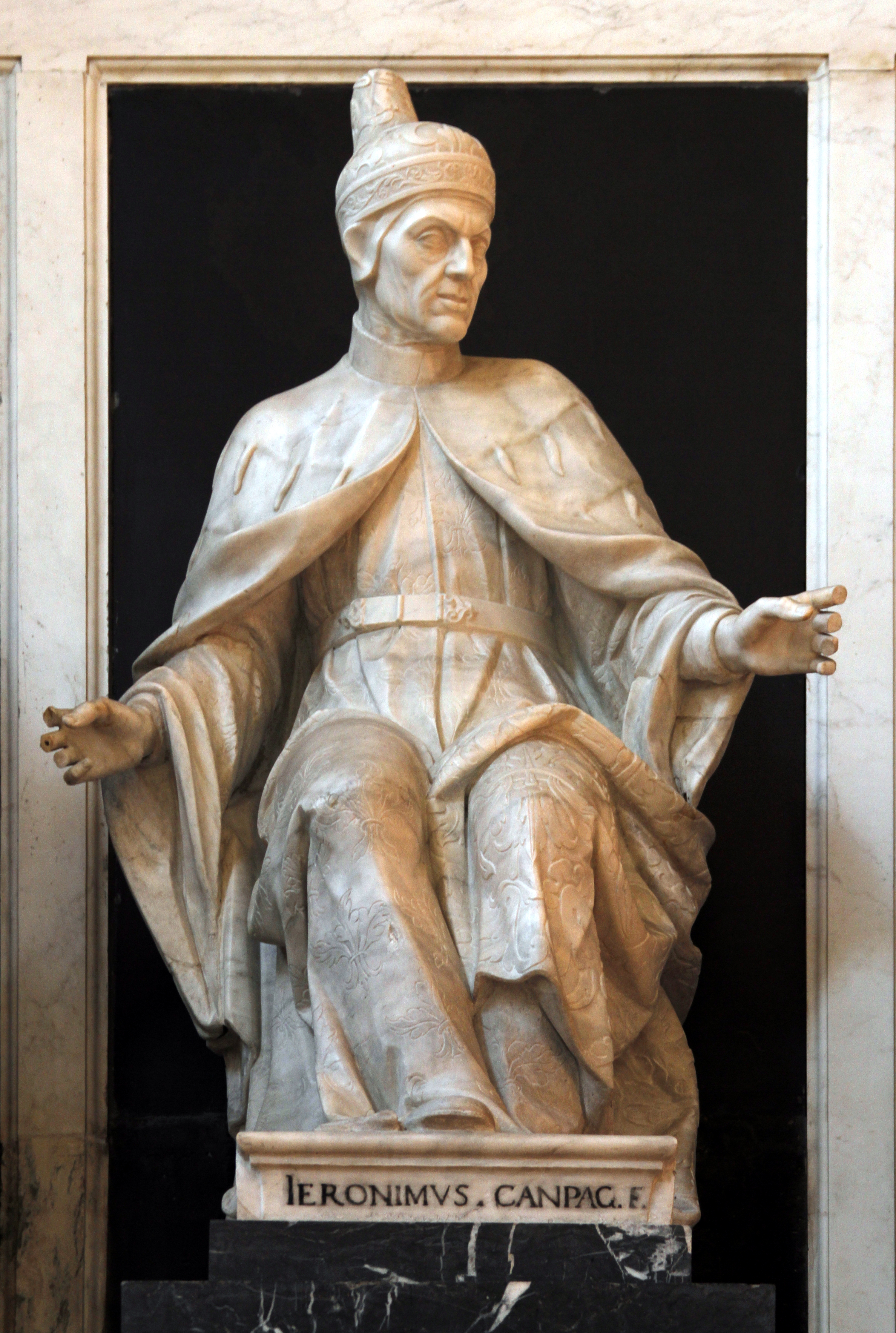 Doge Leonardo Loredan - Santi Giovanni e Paolo - Venice